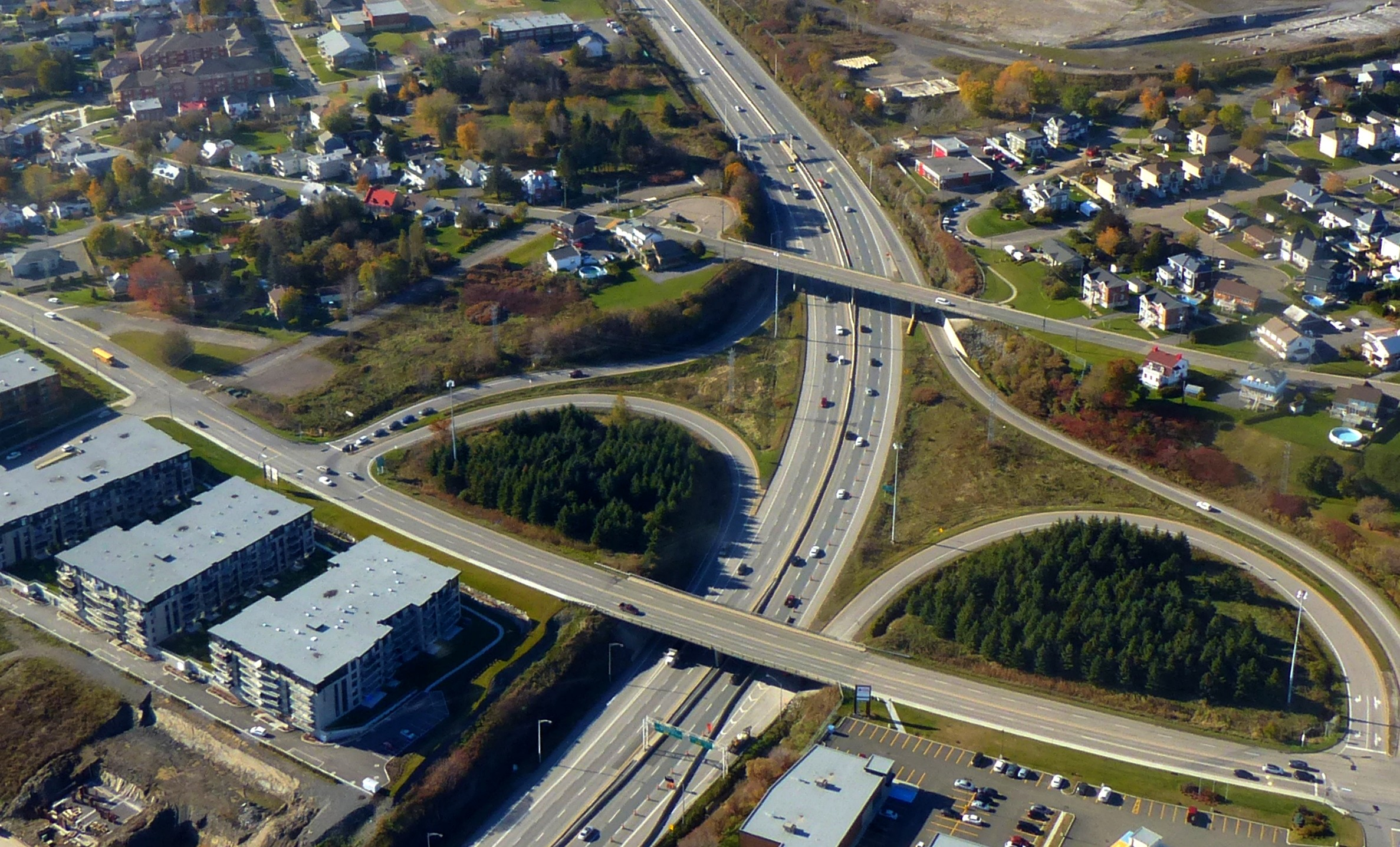 Québec City – Autoroute Felix-Leclerc - Boulevard des Chutes